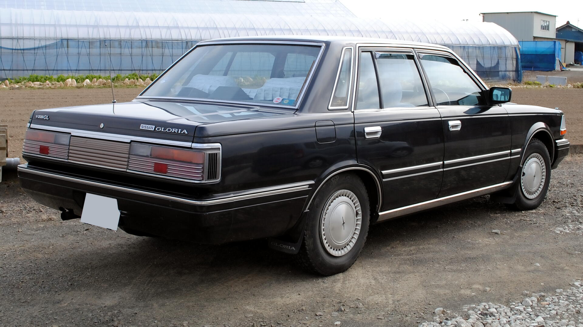 日産・グロリア（Y30型セダン）